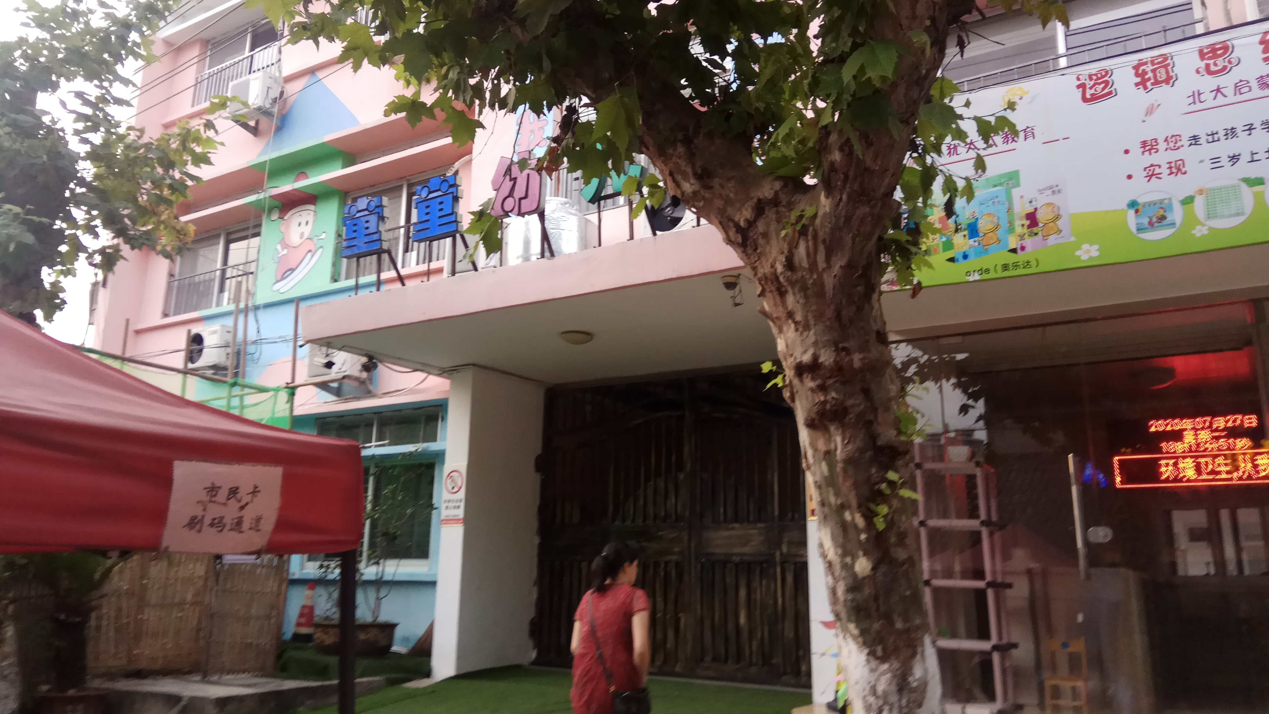 中文（中国大陆）: 浙江省玉环市西青街